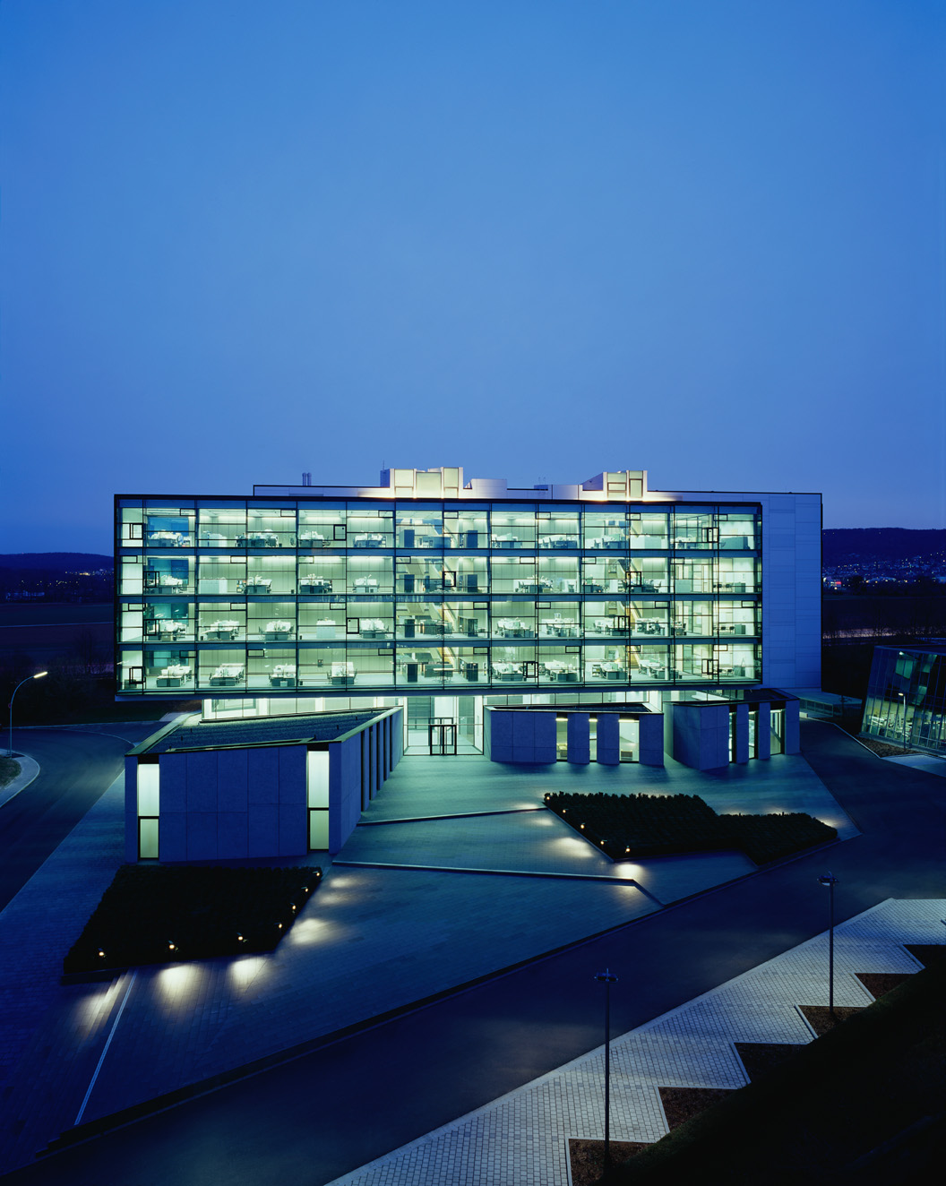 TRUMPF Vertriebs- und Servicezentrum